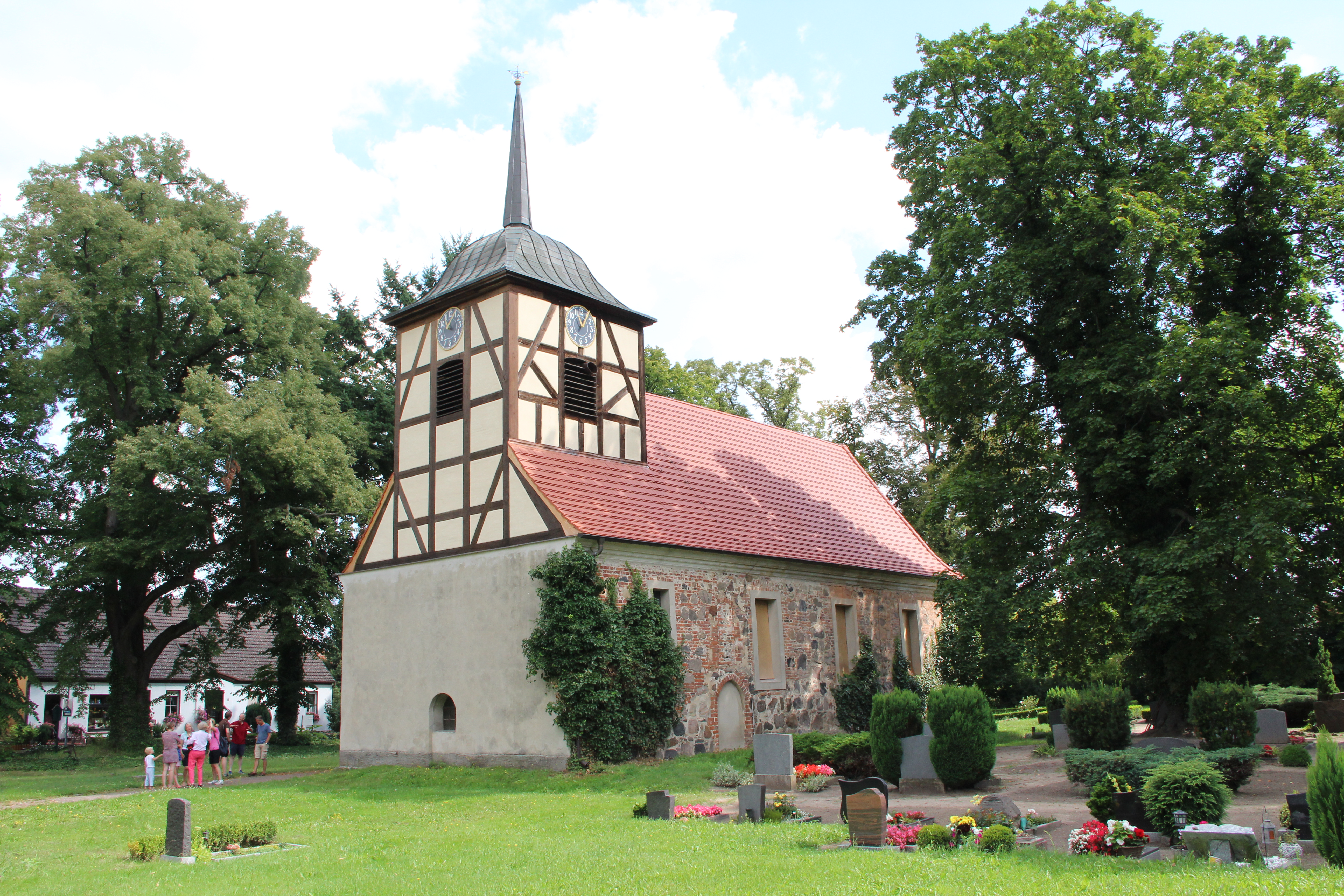 Dorfkirche Stechow Seite